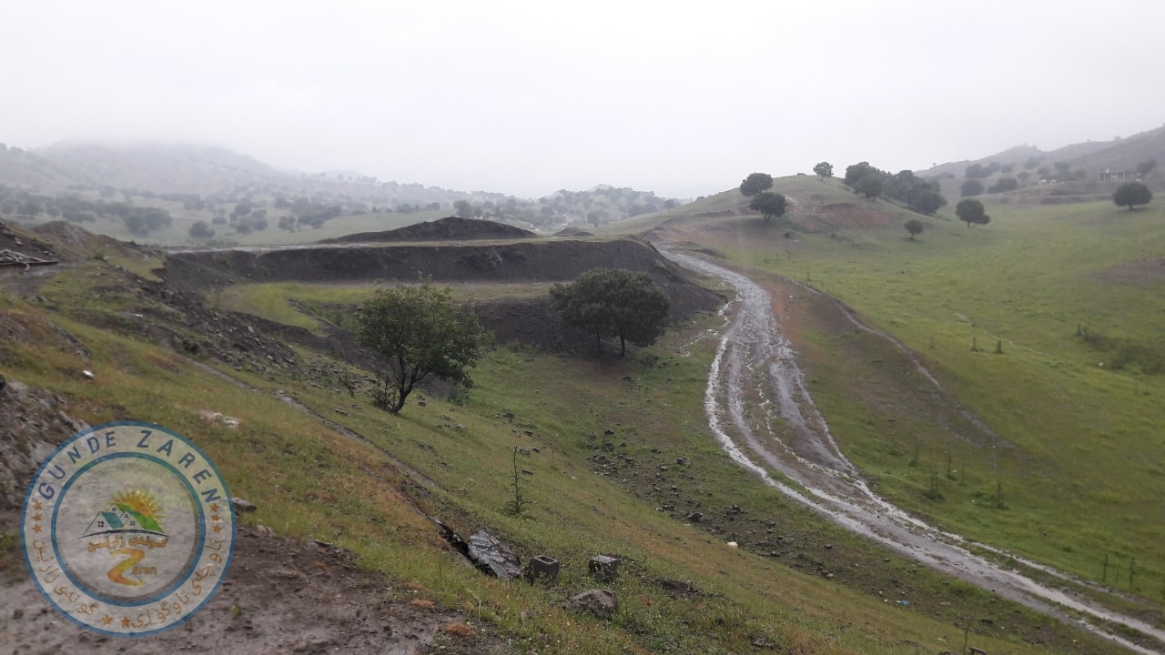 کوردی: گوندی زارێن